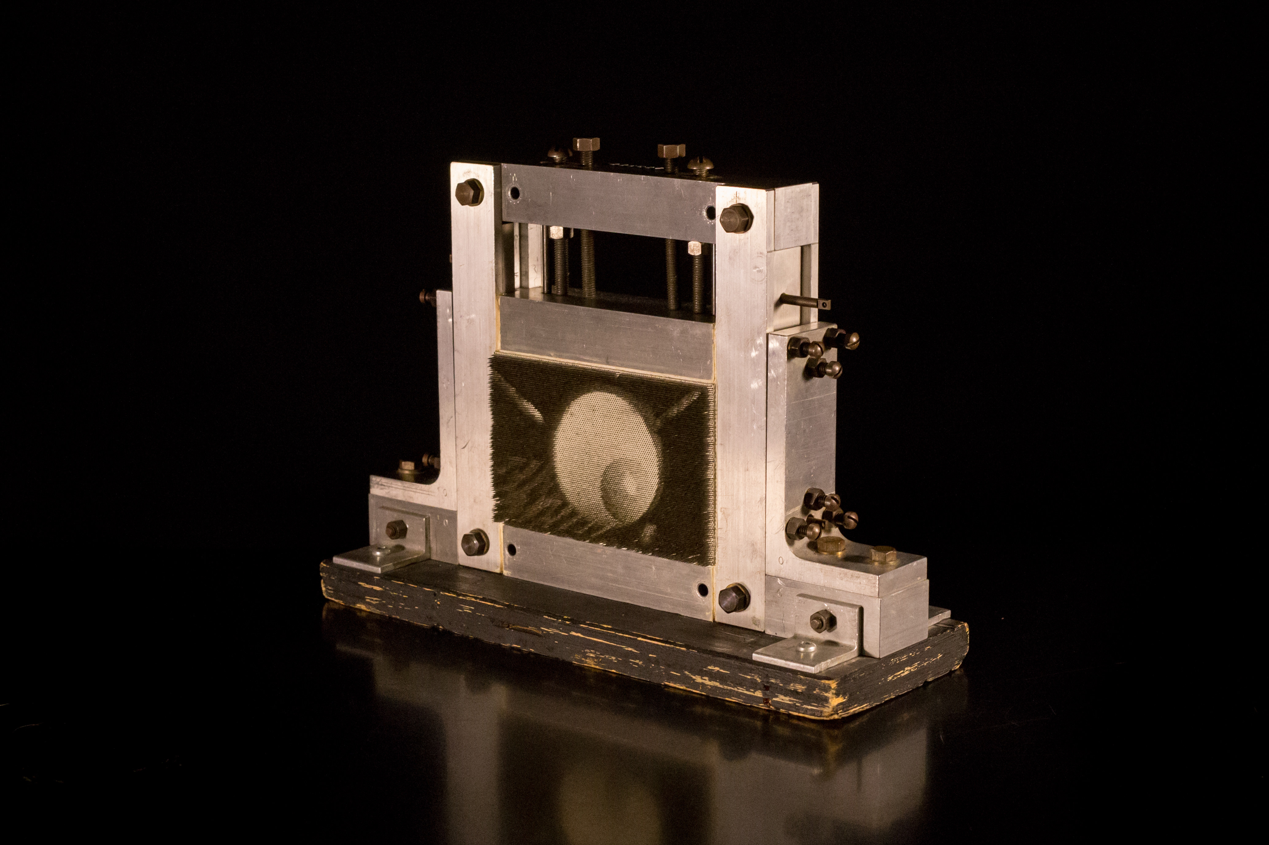 Écran d'épingles Baby Screen servant à la réalisation de films d'animation. Photo prise à la Médiathèque Guy-L.-Coté de la Cinémathèque québécoise.